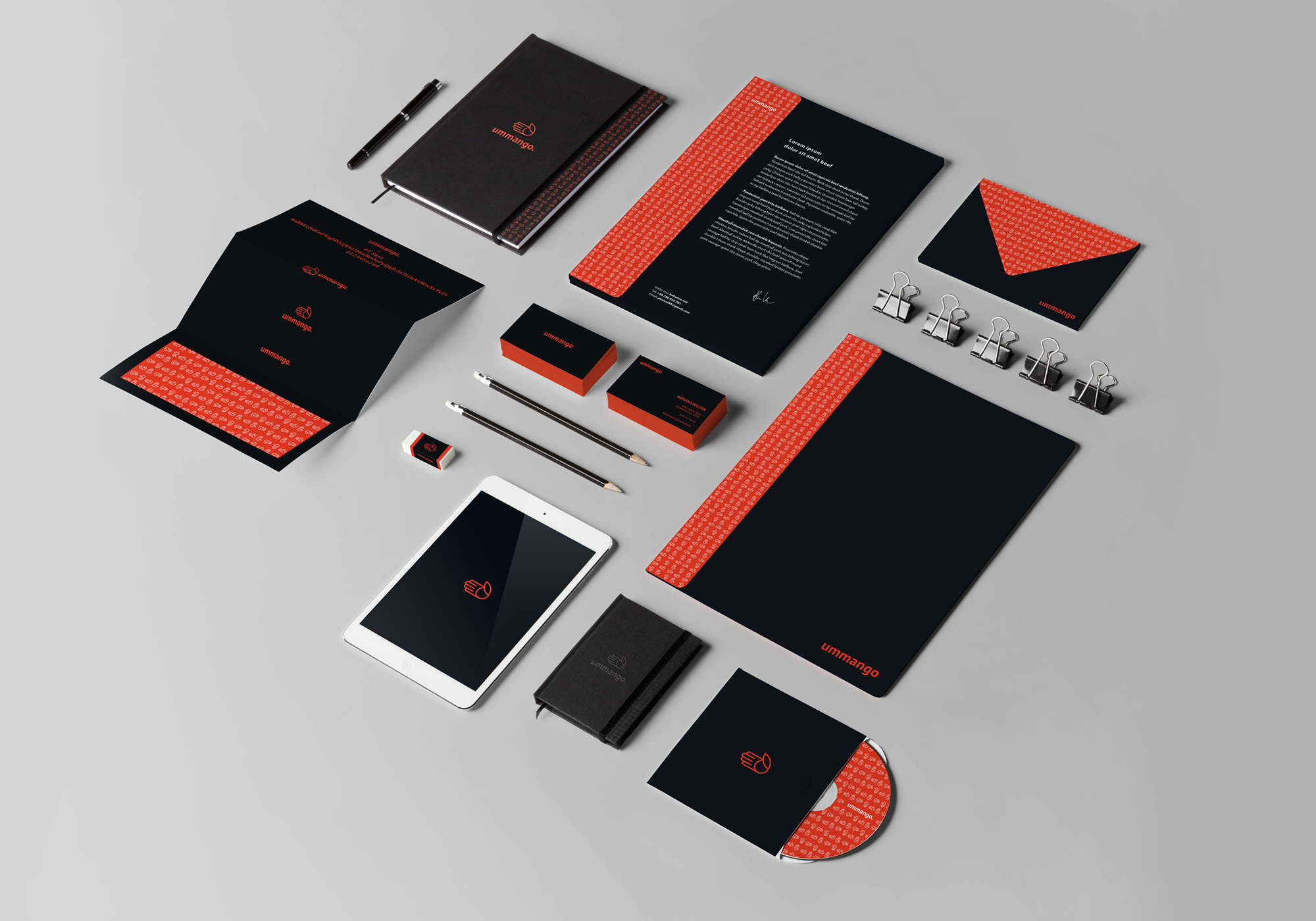 Identyfikacja firmy ummango przygotowana na konkurs.